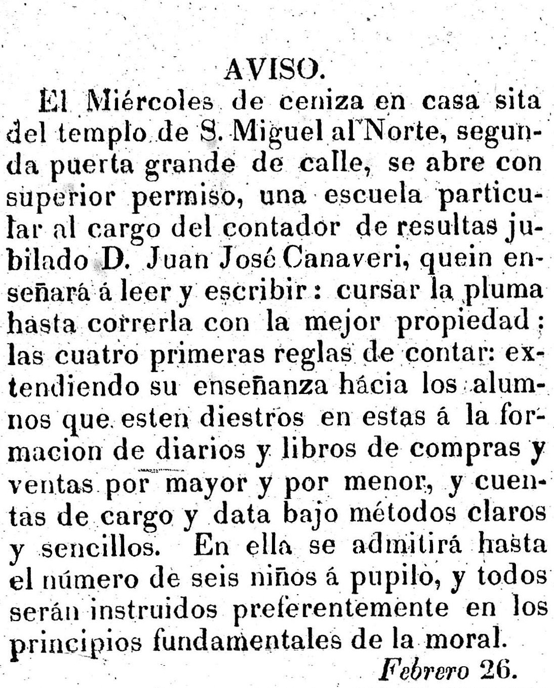 Aviso publicado por La Gaceta Mercantil n° 21, en el cual don Juan José Canaveris (1780-1837), publica anuncio sobre la apertura de escuela particular